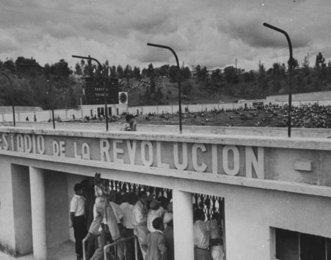 Estadio de la Revolución, inagurado en 1950